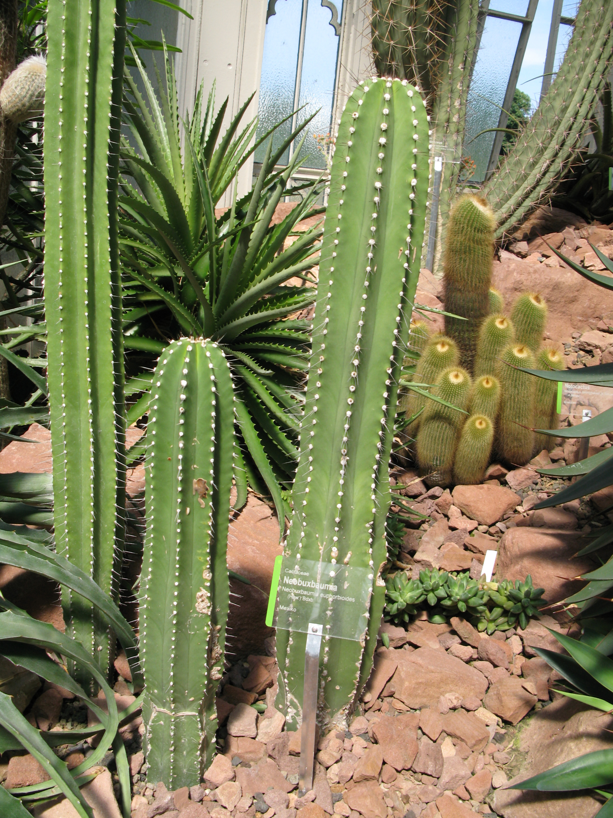 Cactaceae - Neobuxbaumia euphorbioides aus Mexiko